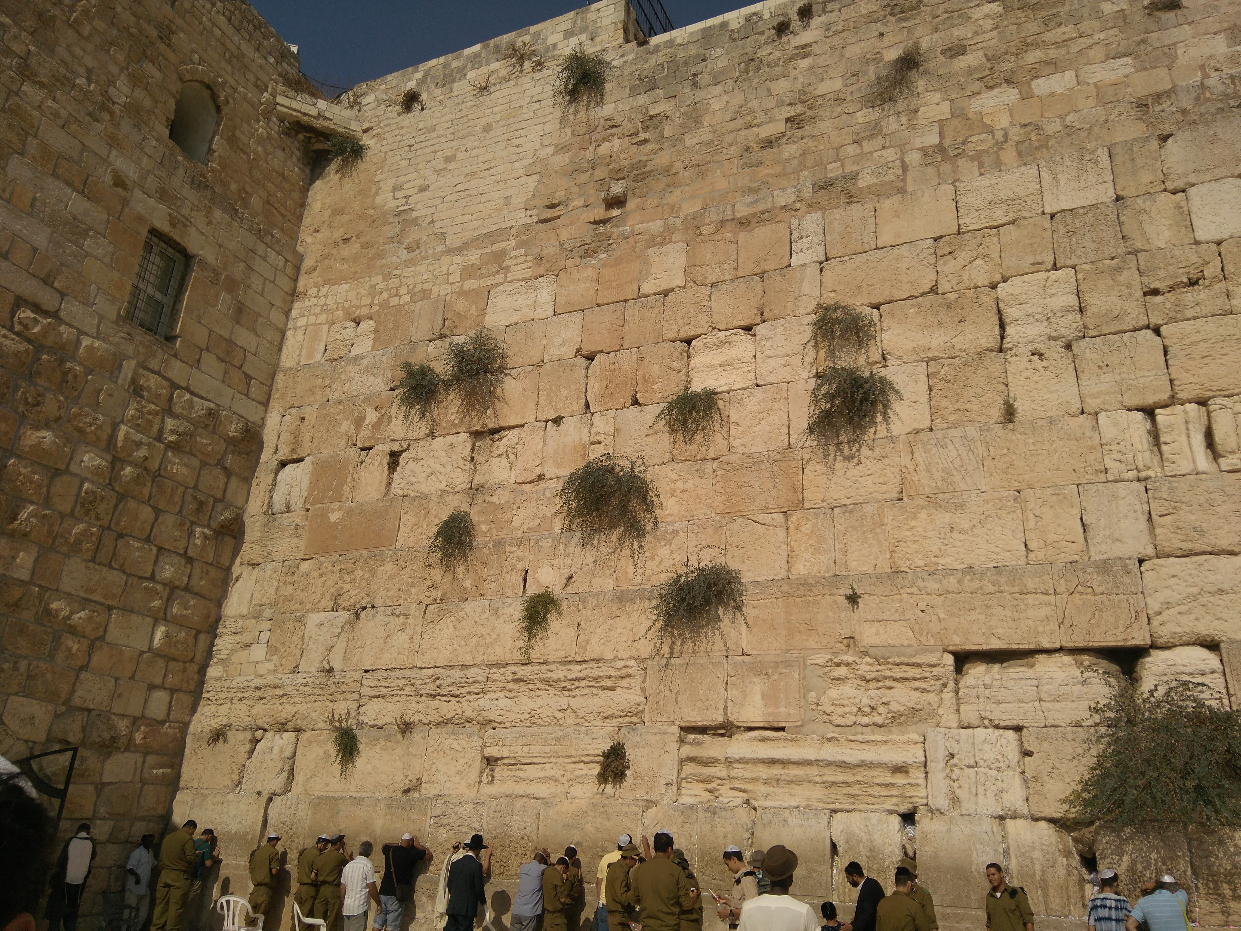 Muro de las Lamentaciones (Jerusalén)